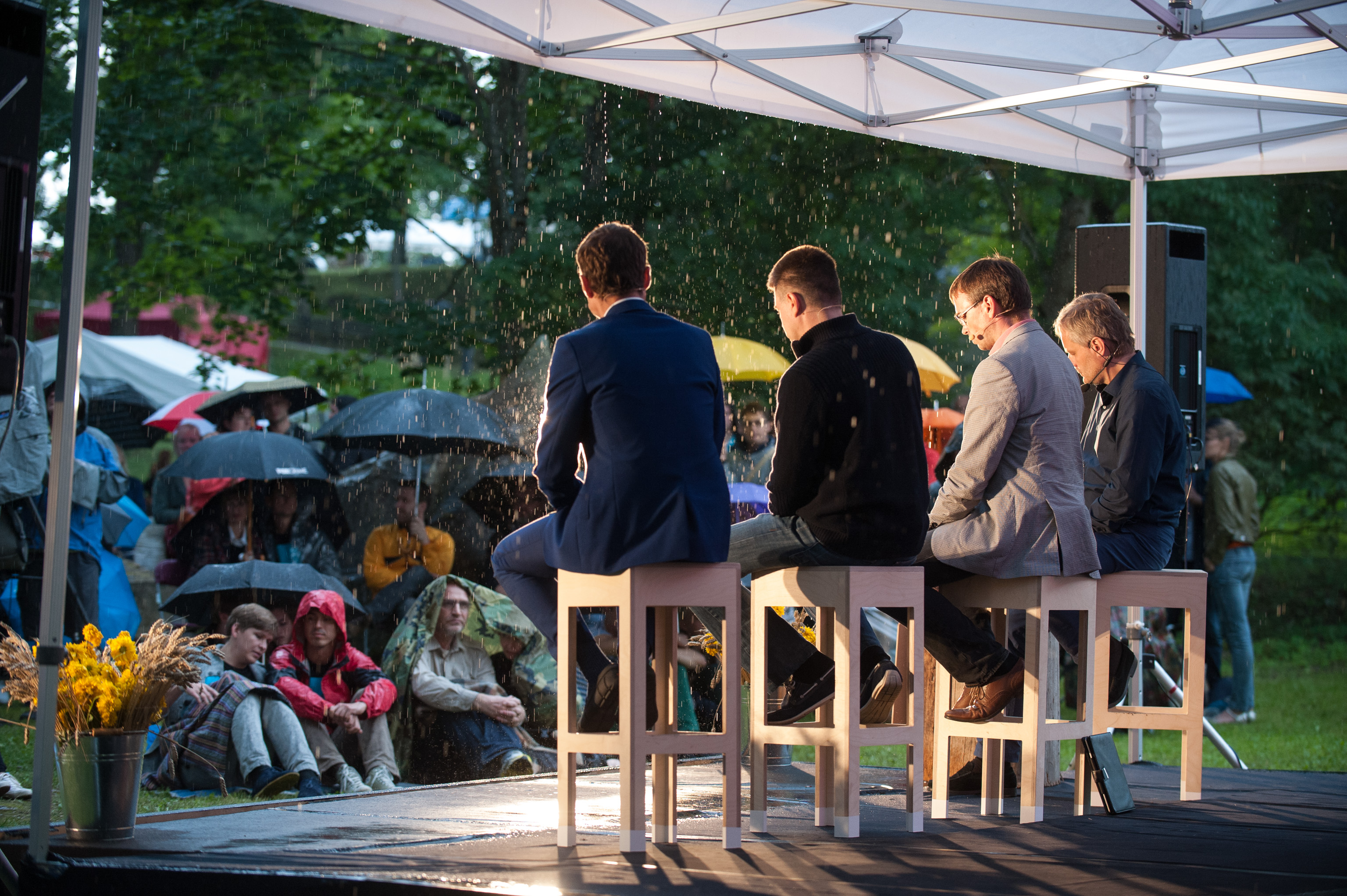 Arvamusfestival 2014; Parlamendierakondade juhtide debatt; Sven Mikser; Urmas Reinsalu; Taavi Rõivas